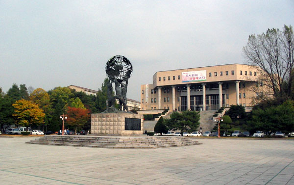 춘천에 있는 강원대학교 미래광장. 뒤에 보이는 건물은 중앙도서관이다. 중앙도서관은 총 5층으로 구성되어 있으며 건물 4층은 학생들이 공부할 수 있는 열람실로 이용되고 있다. 2007년은 개교 60년으로 다양한 행사가 계획되어 있다.